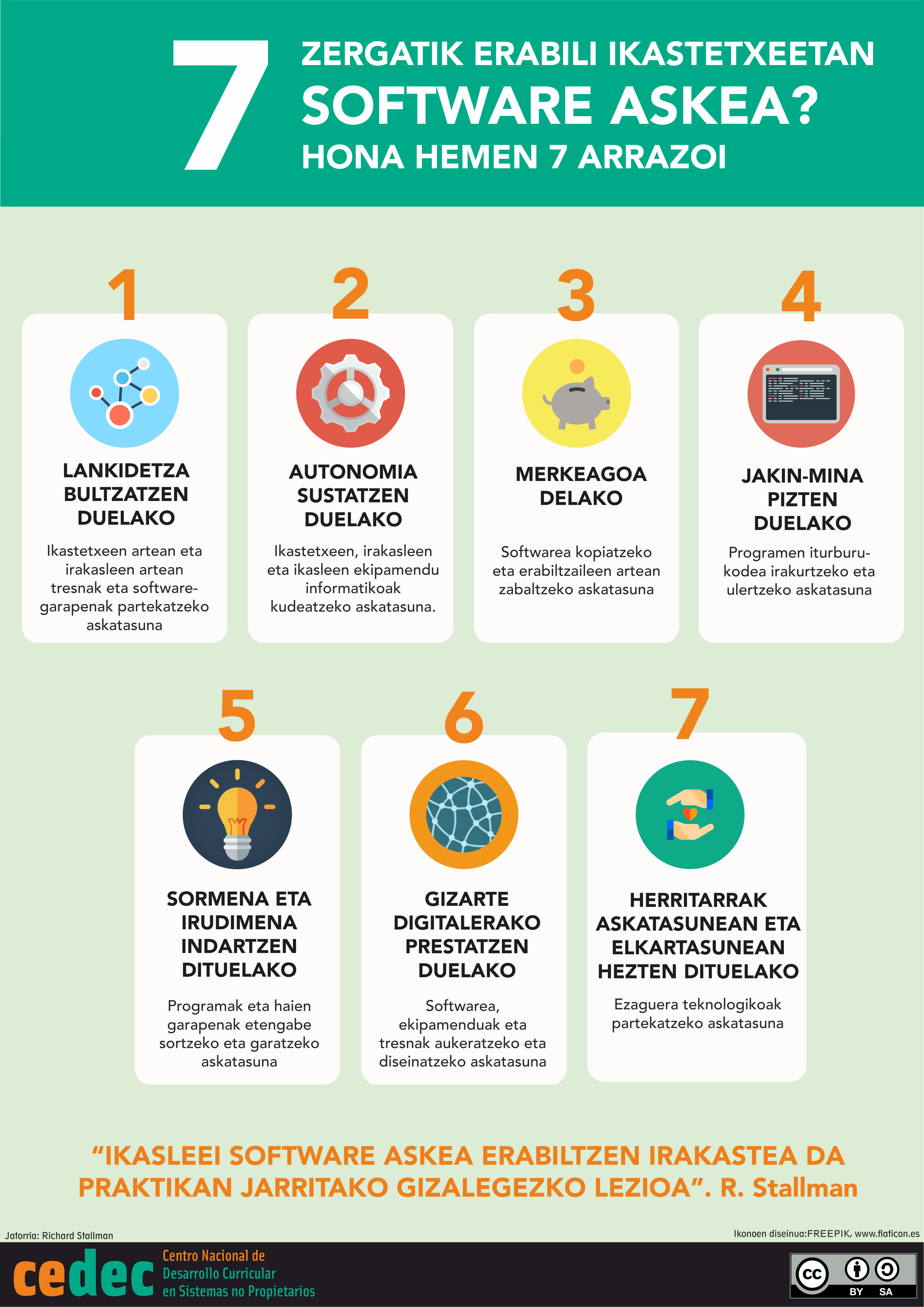 Zergatik erabili ikastetxeetan software askea? Zazpi arrazoi.